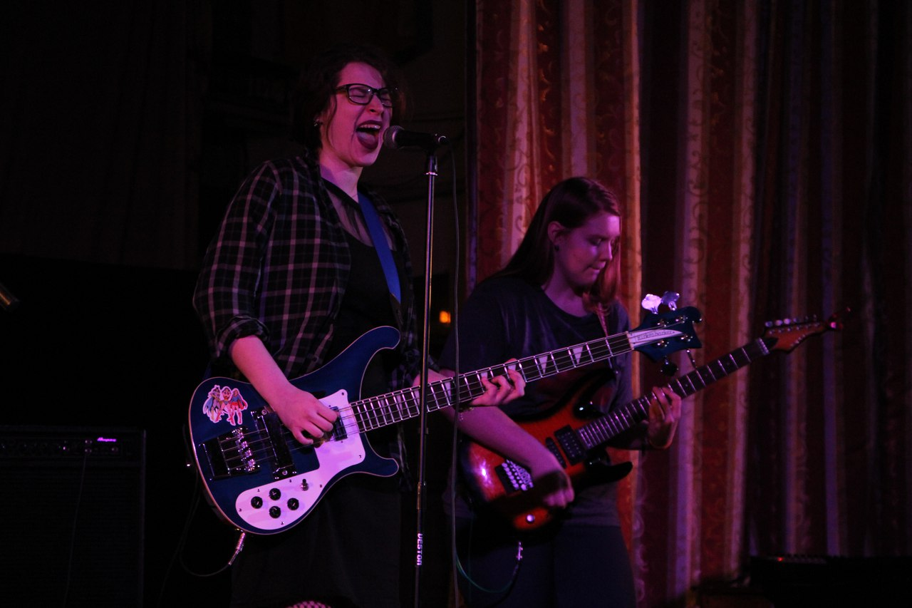 Участники фестиваля разных лет.